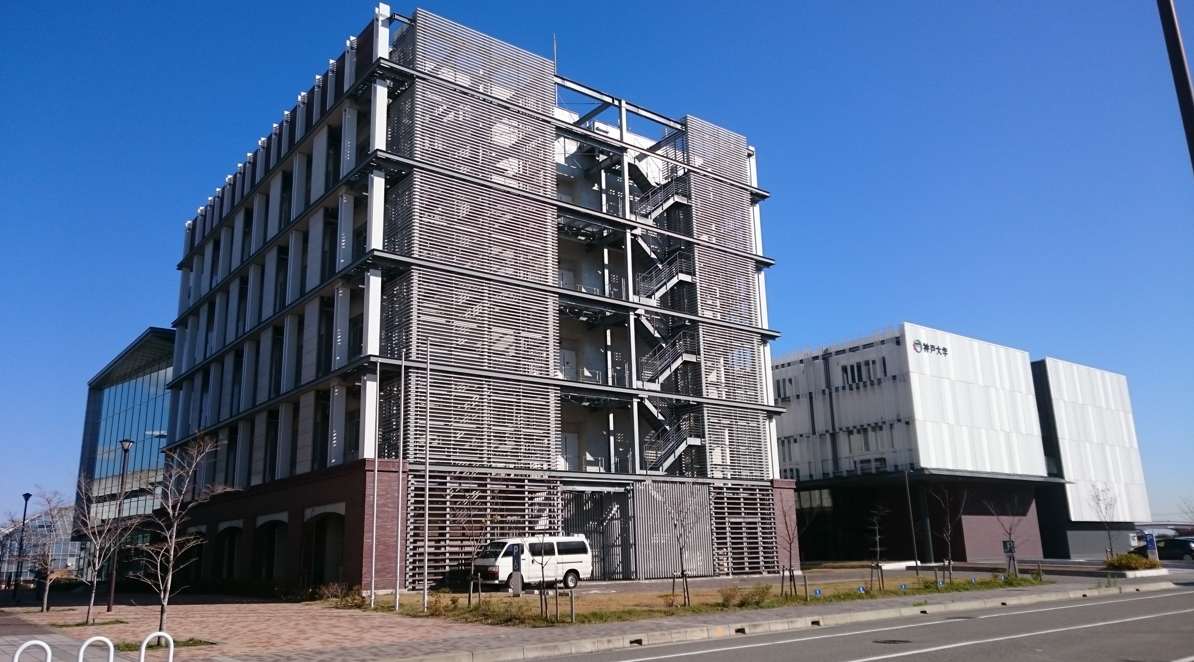 神戸大学統合研究拠点を北西から望む